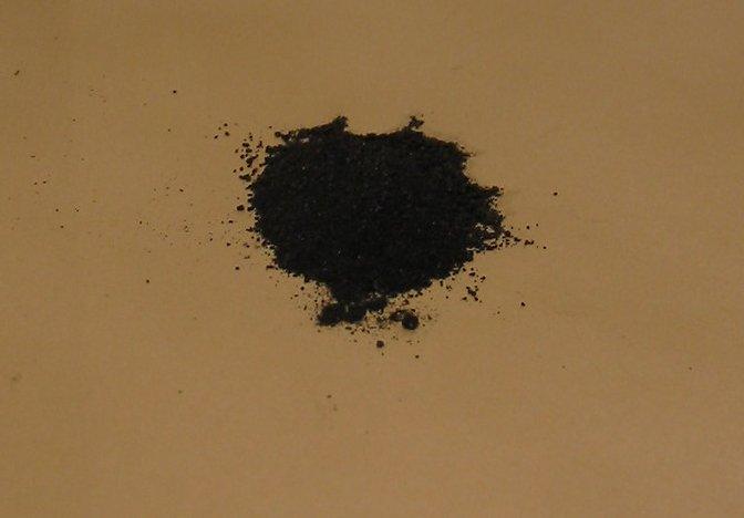 Kuivapareista eristettyä mangaanidioksidia.